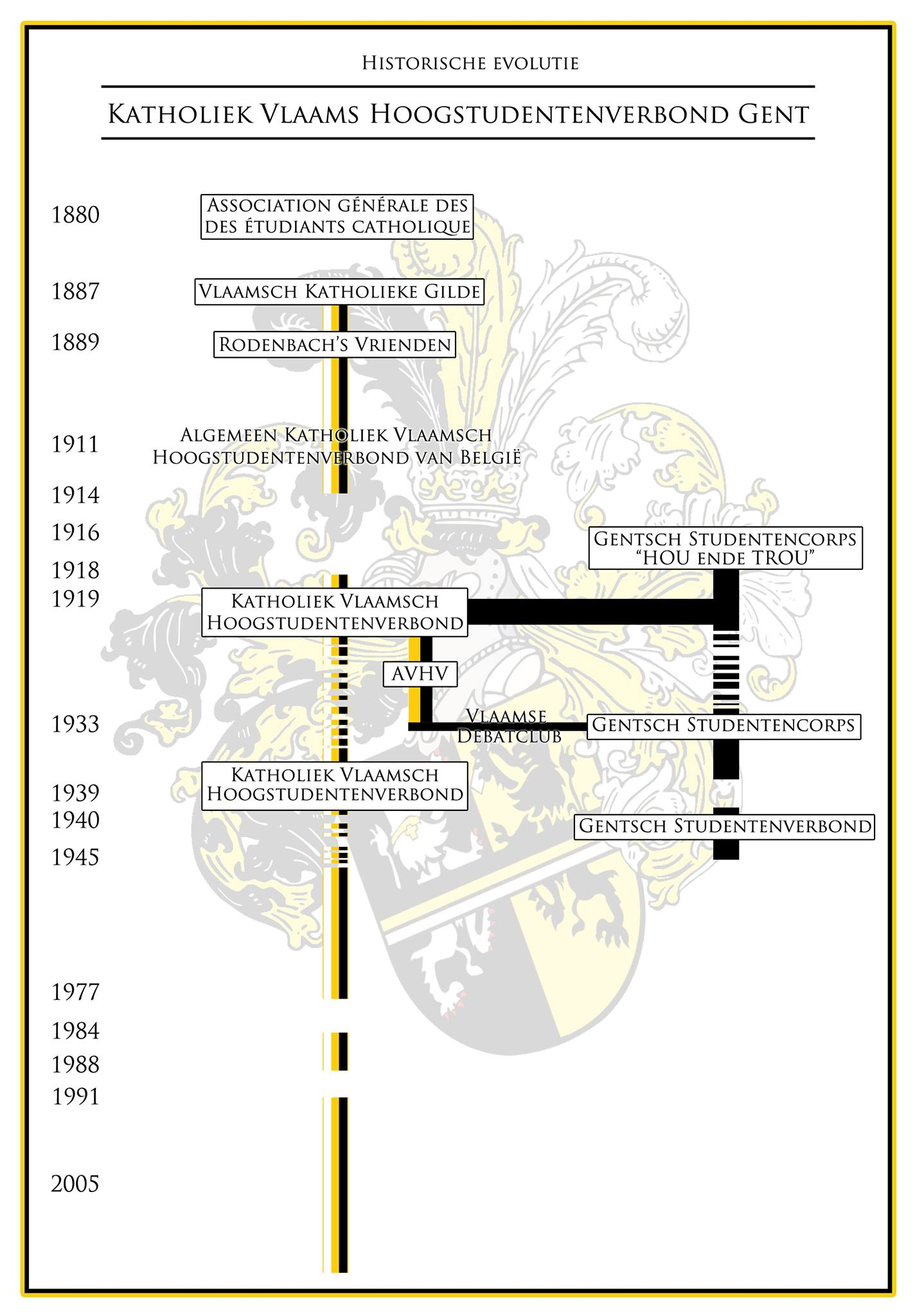 Historisch overzicht KVHV-Gent